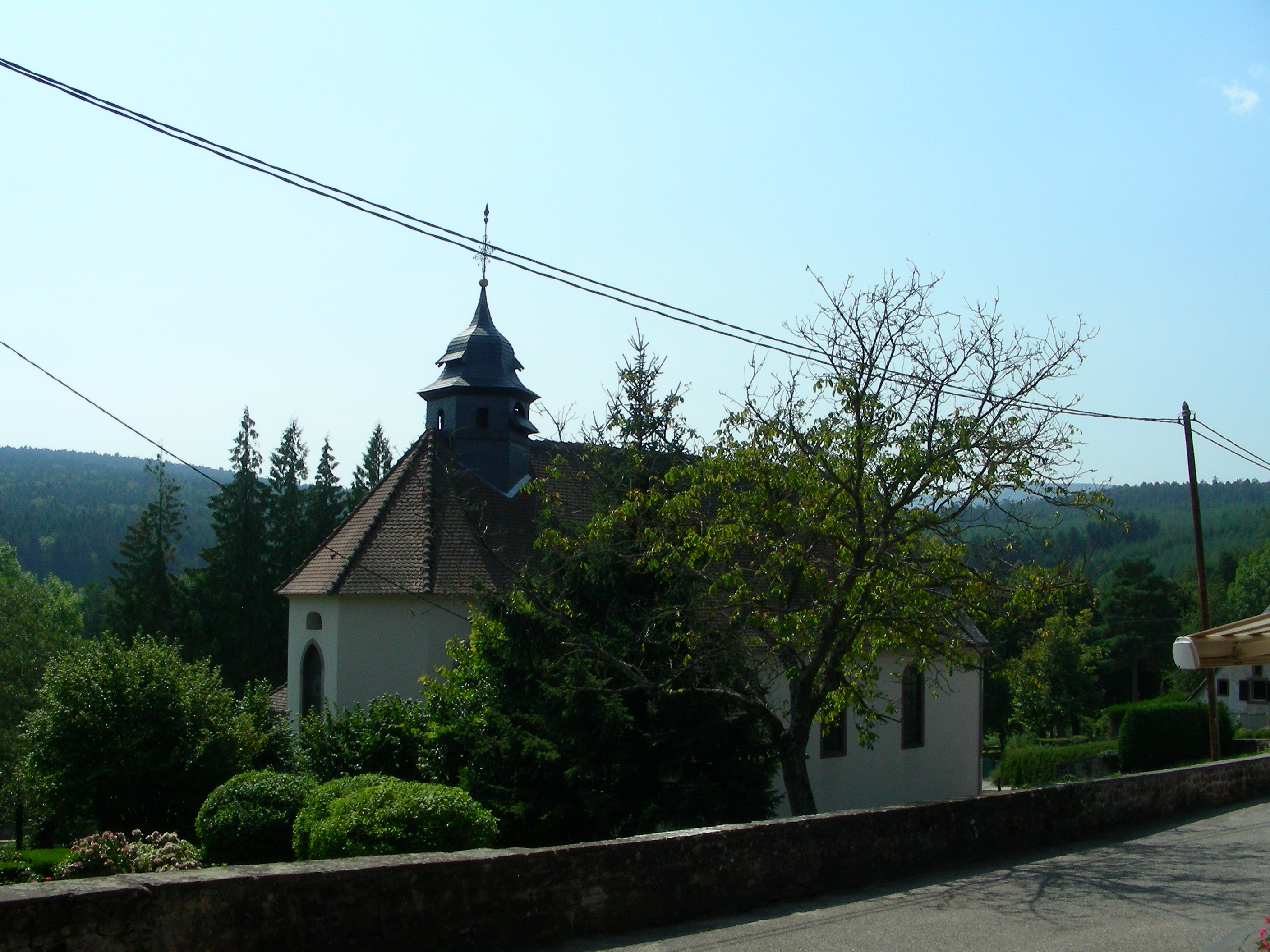 Eglise de Birkenwald